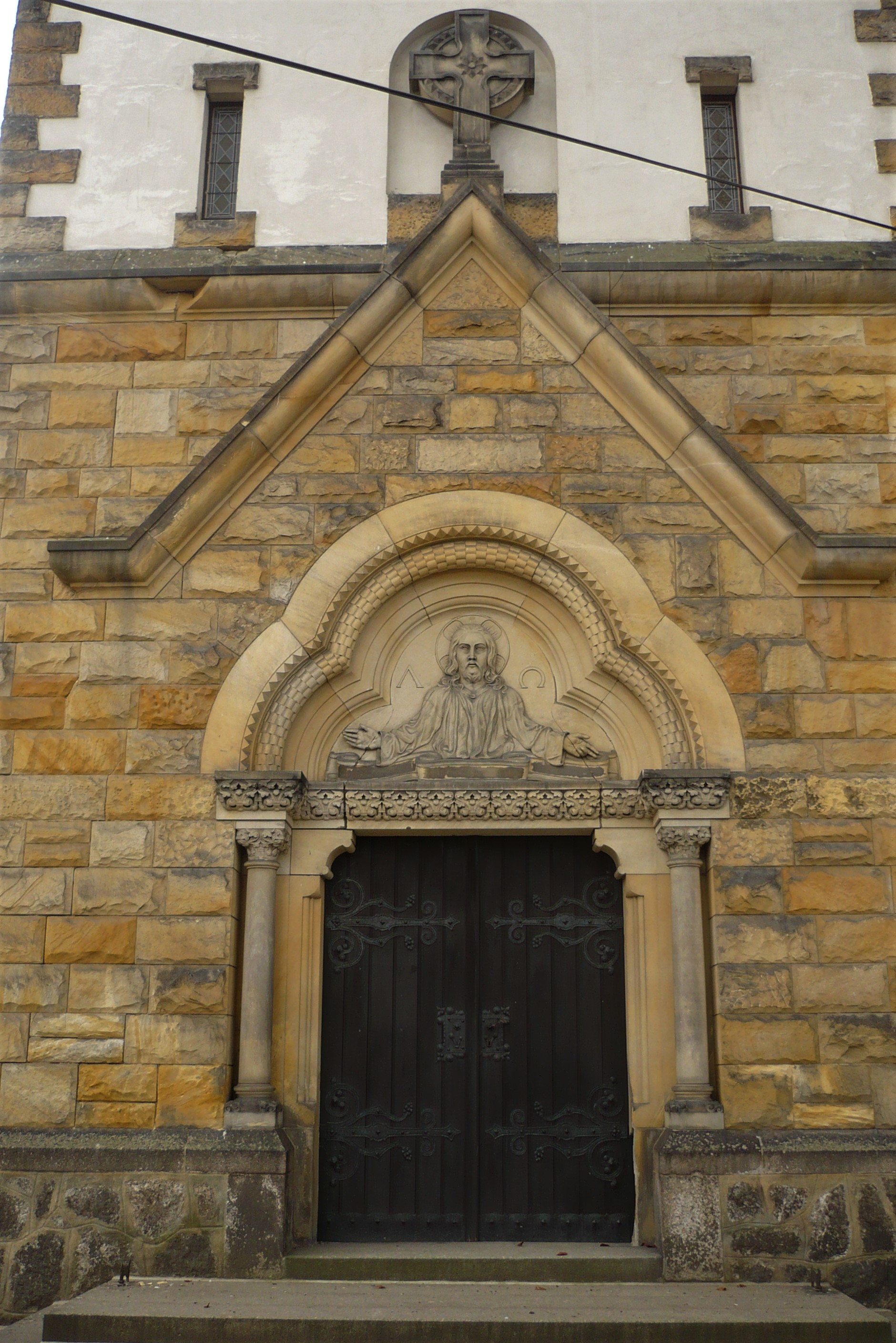 Frýdlant